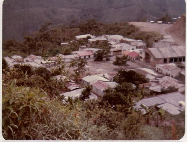 Imagen tomada por un habitante en los años 80´s